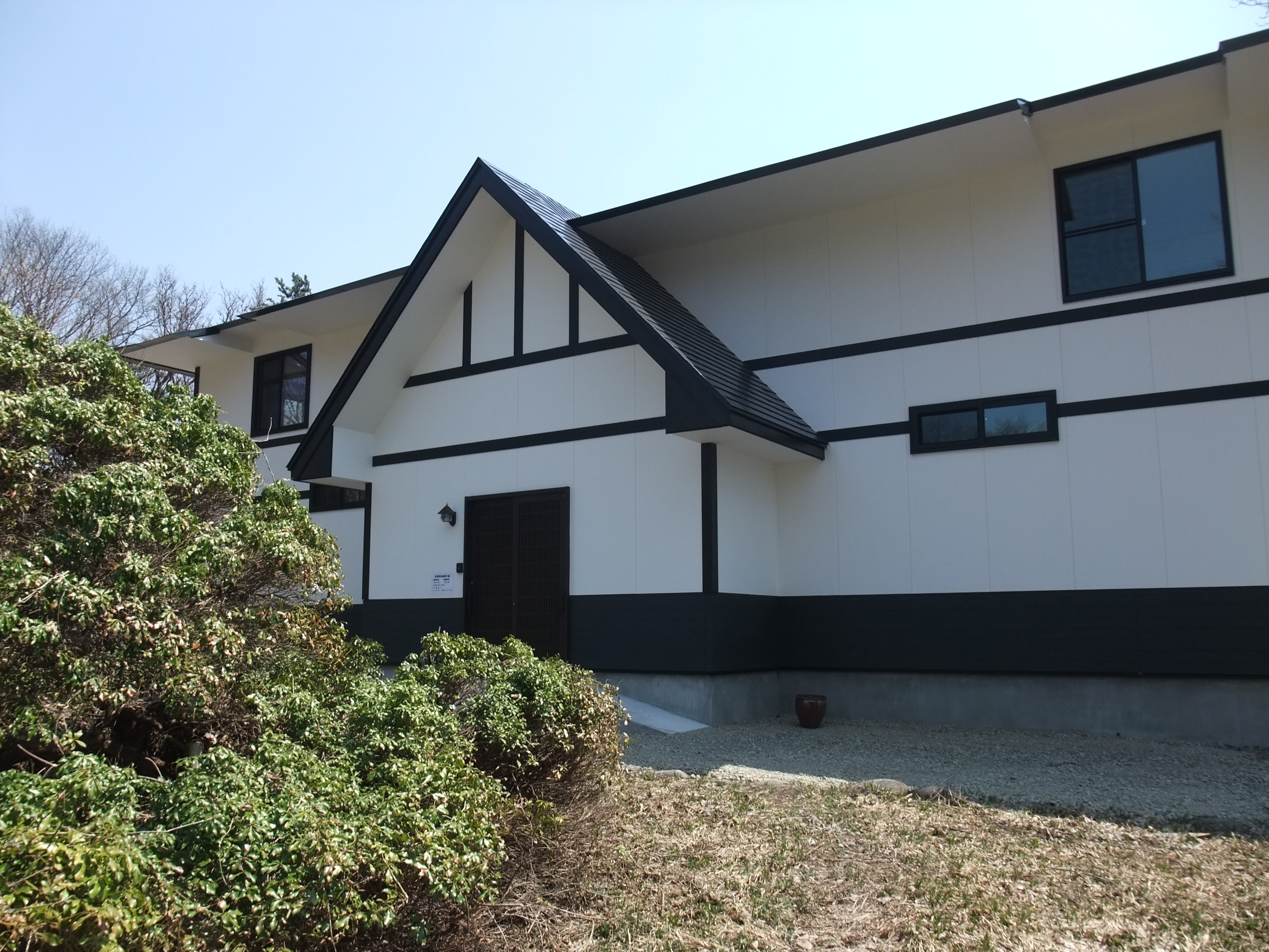 毛馬内柏崎館